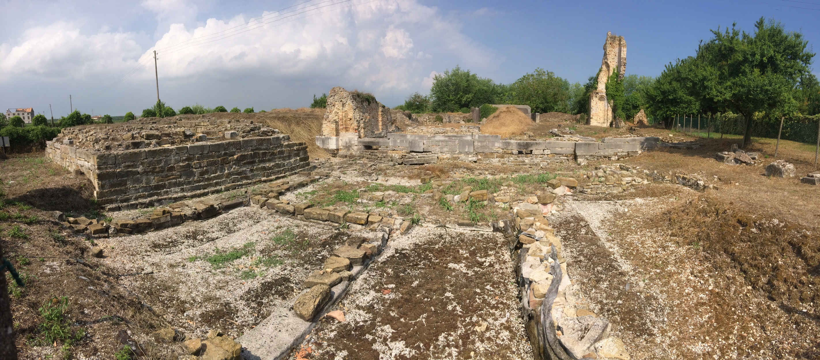 Resti della cattedrale di Santa Maria a Jesolo al giugno 2015